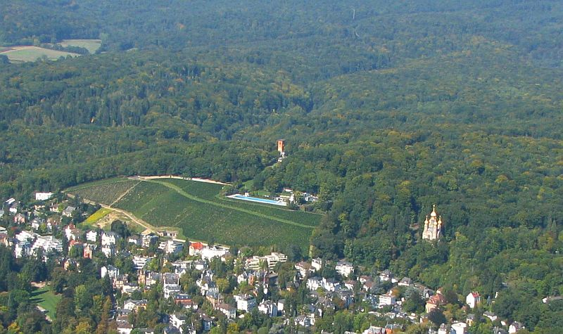 Luftbild Neroberg Wiesbaden Opelbad Griechische Kapelle russisch-orthodoxe Kirche Monopteros der turm Turmcafe